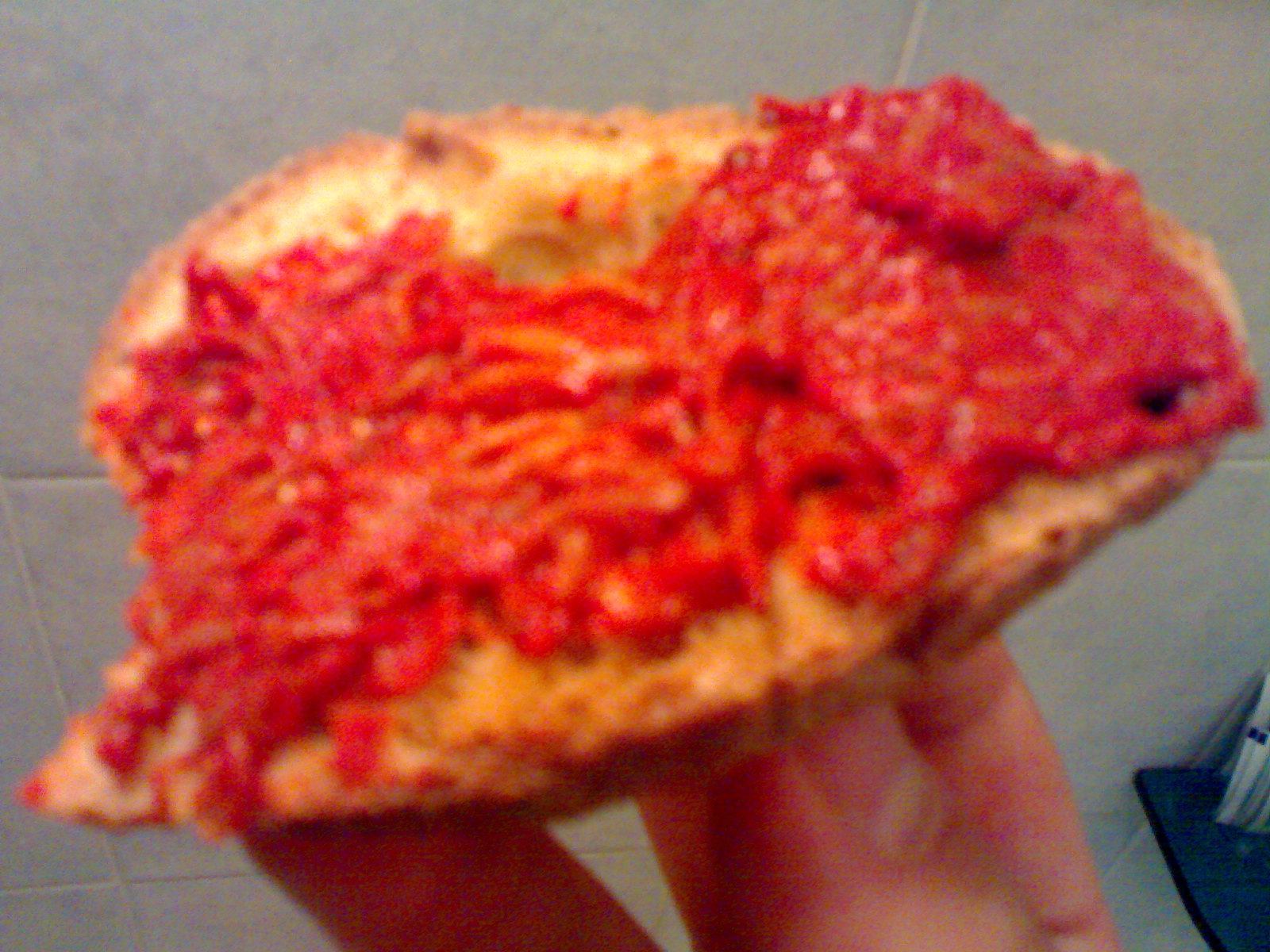 La sardella